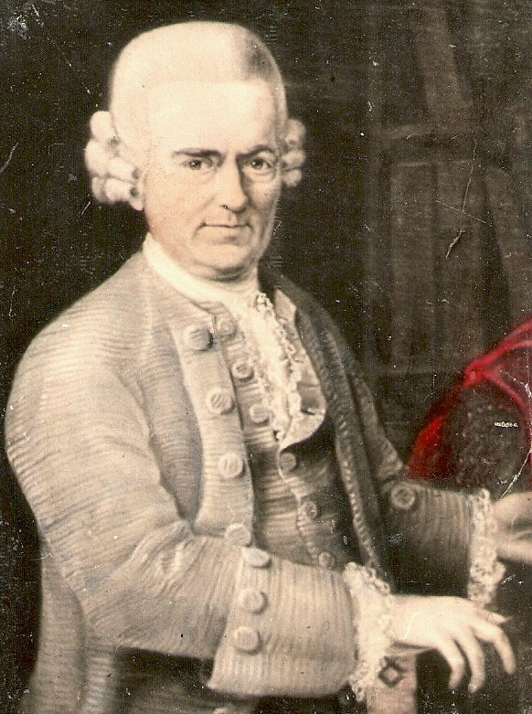 Portrait Philipp Adolf Boehmer